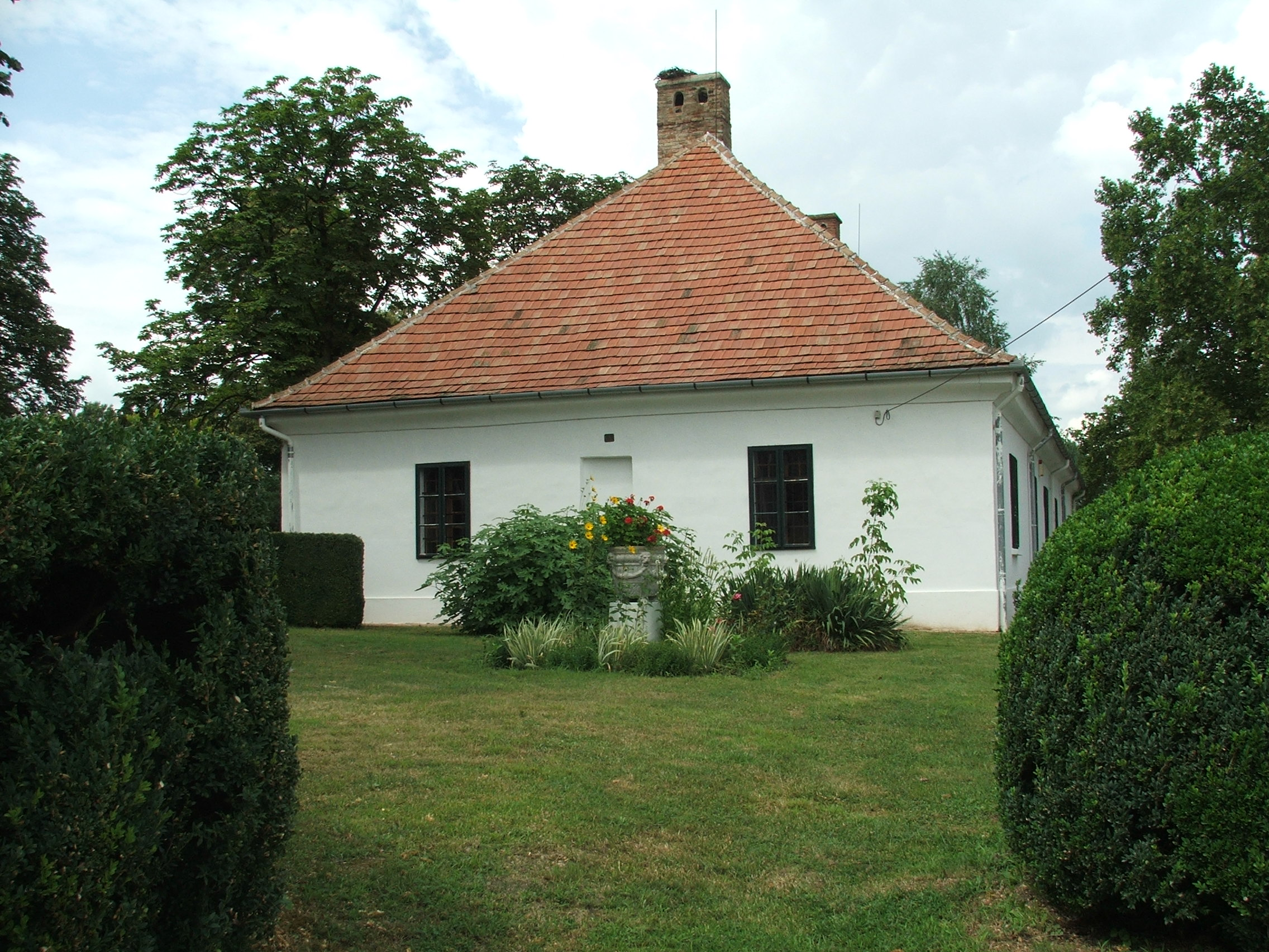 Kunffy Lajos Emlékmúzeum, volt Bosnyák-kúria, Somogytúr This is a photo of a monument in Hungary. Identifier: 8096